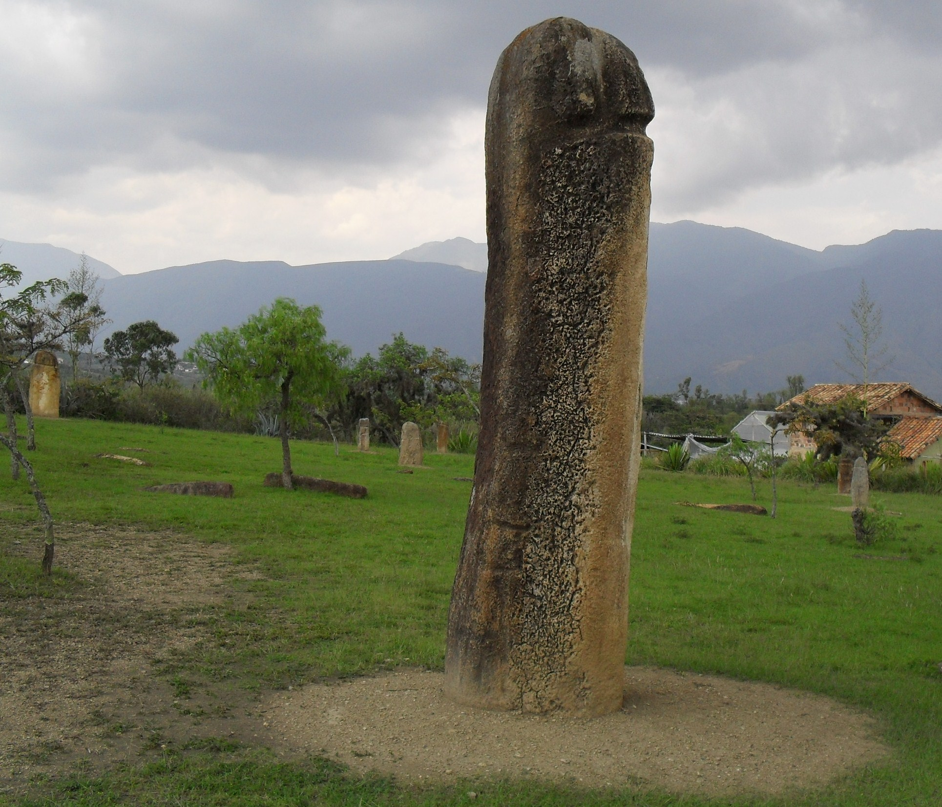 Megalito fálico en el Parque Arqueológico de Monquirá (infiernito), en inmediaciones a Villa de Leyva, Boyacá, Colombia